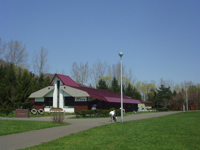 Sapporo Salmon Musium, Sapporo, Japan.